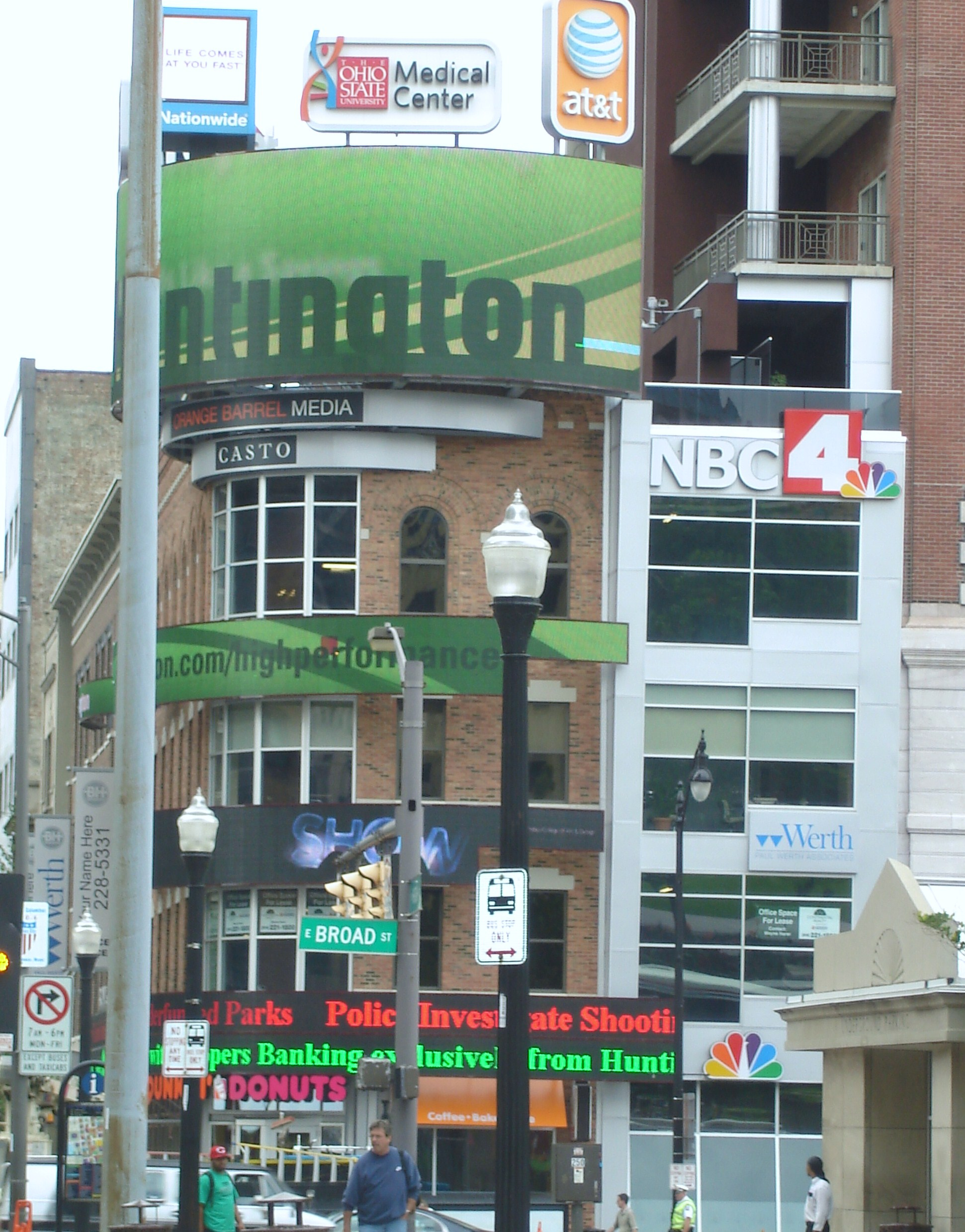 Columbus Capital Square